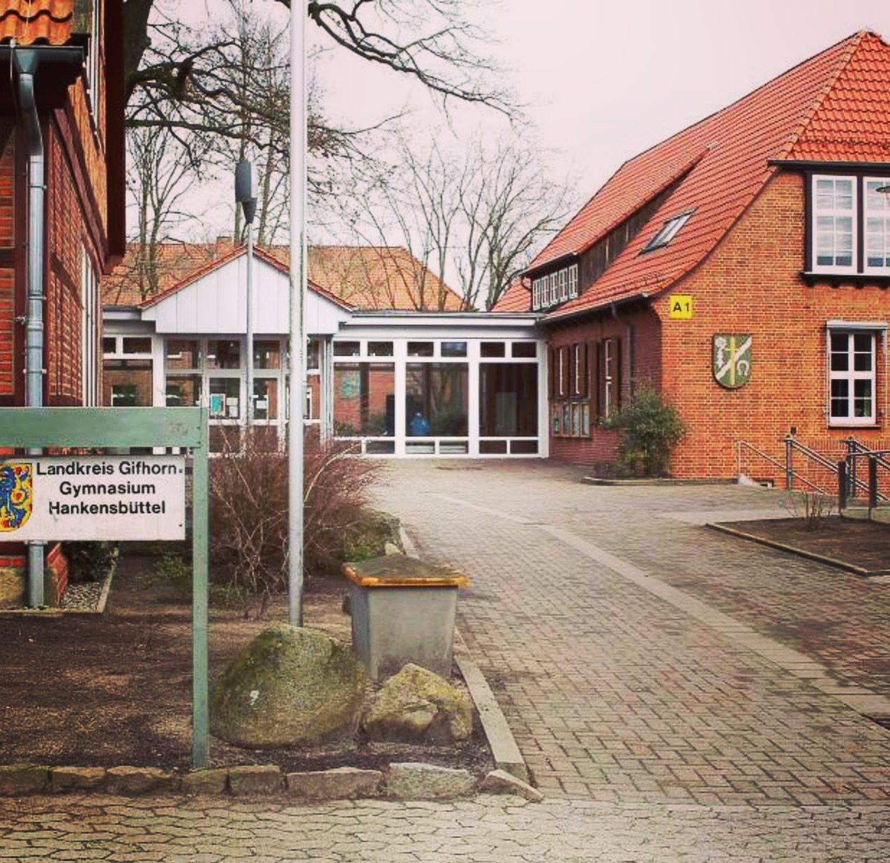 Eingang des Gymnasium Hankensbüttel